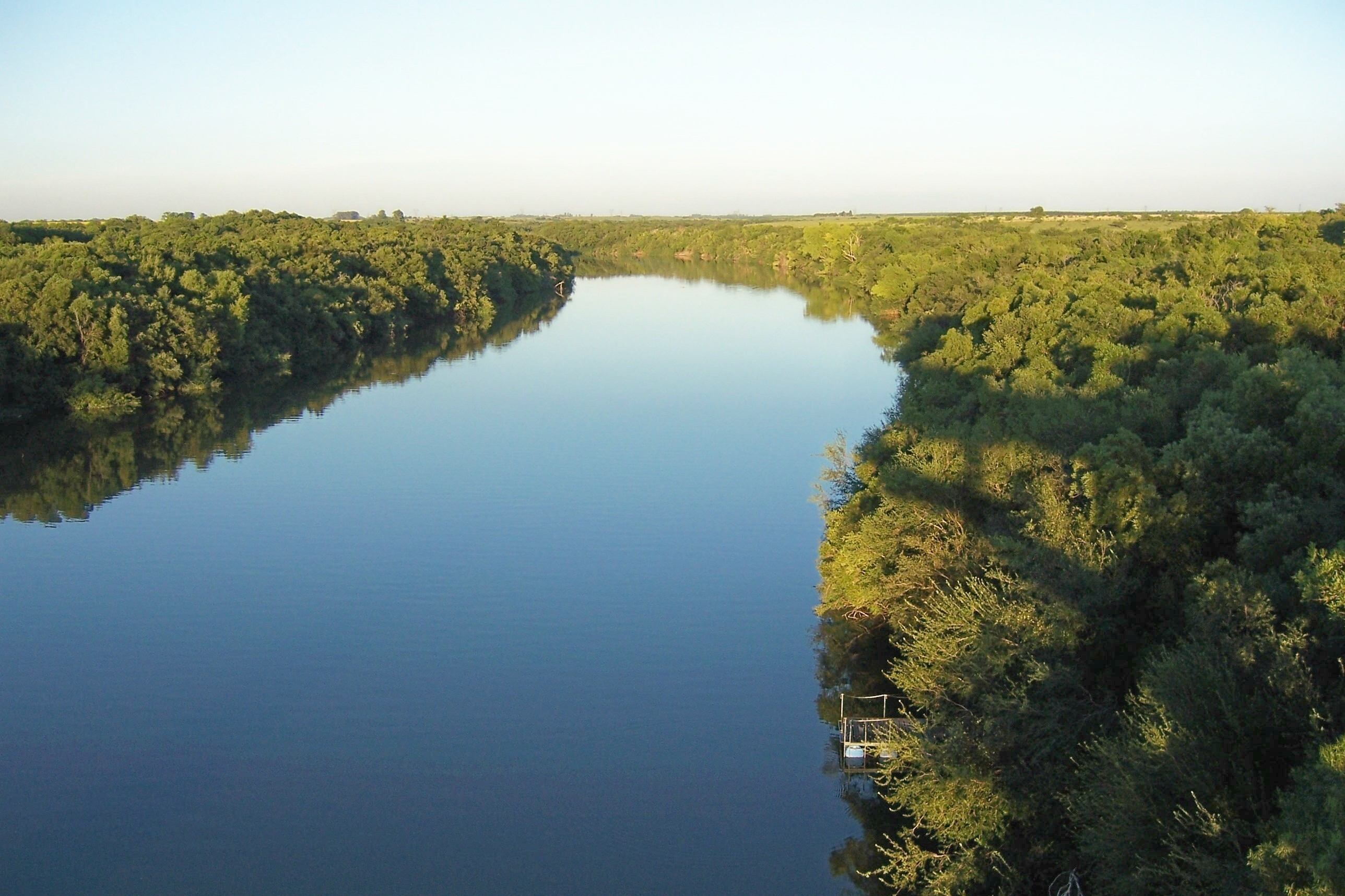 Bosque de ribera del Río Queguay, vista desde el puente ubicado en la Ruta nacional N° 3, departamento de Paysandú.